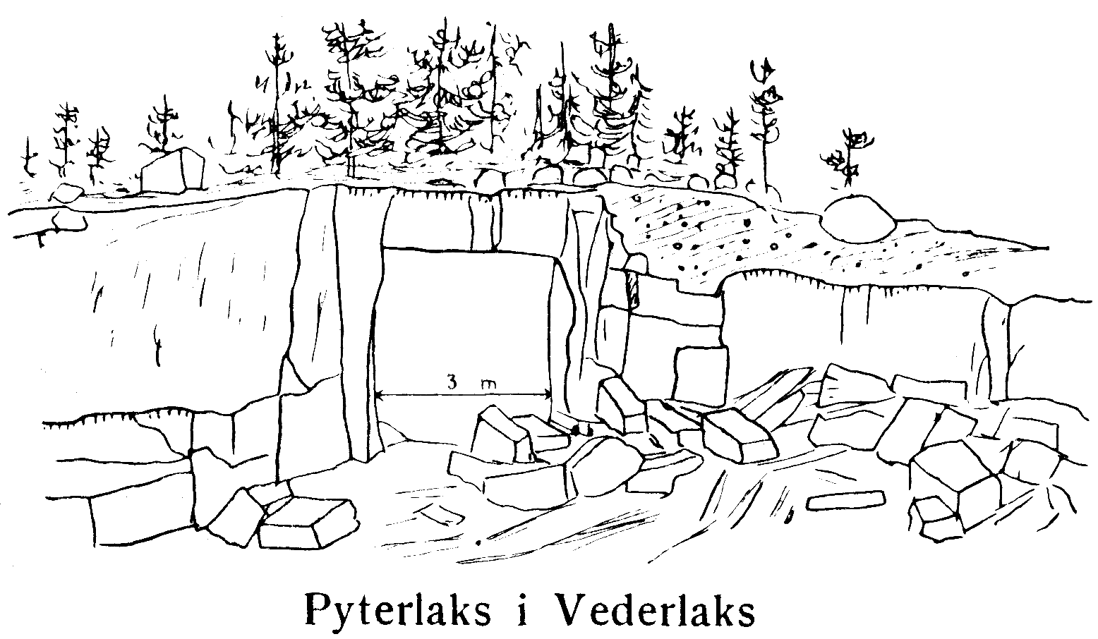 Пютерлахти (фин. Pyterlahti или швед. Pyterlaks).